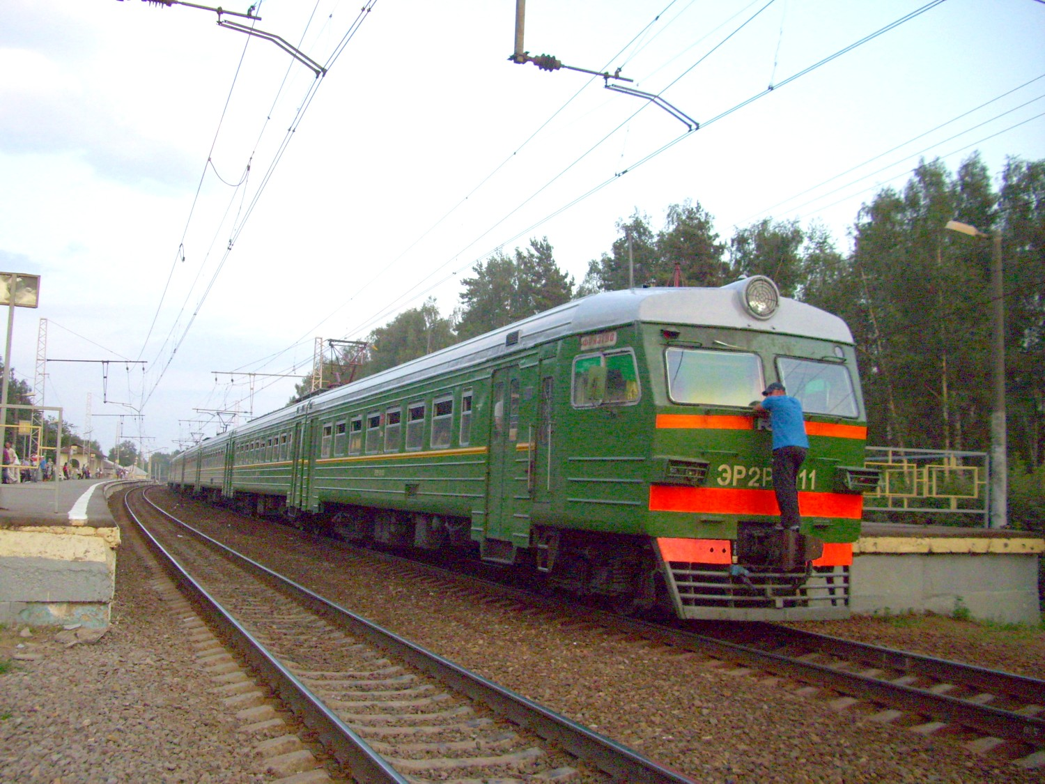 Электропоезд ЭР2Р-7011 с пассажиром-зацепером на станции Купавна (в направлении Владимира)